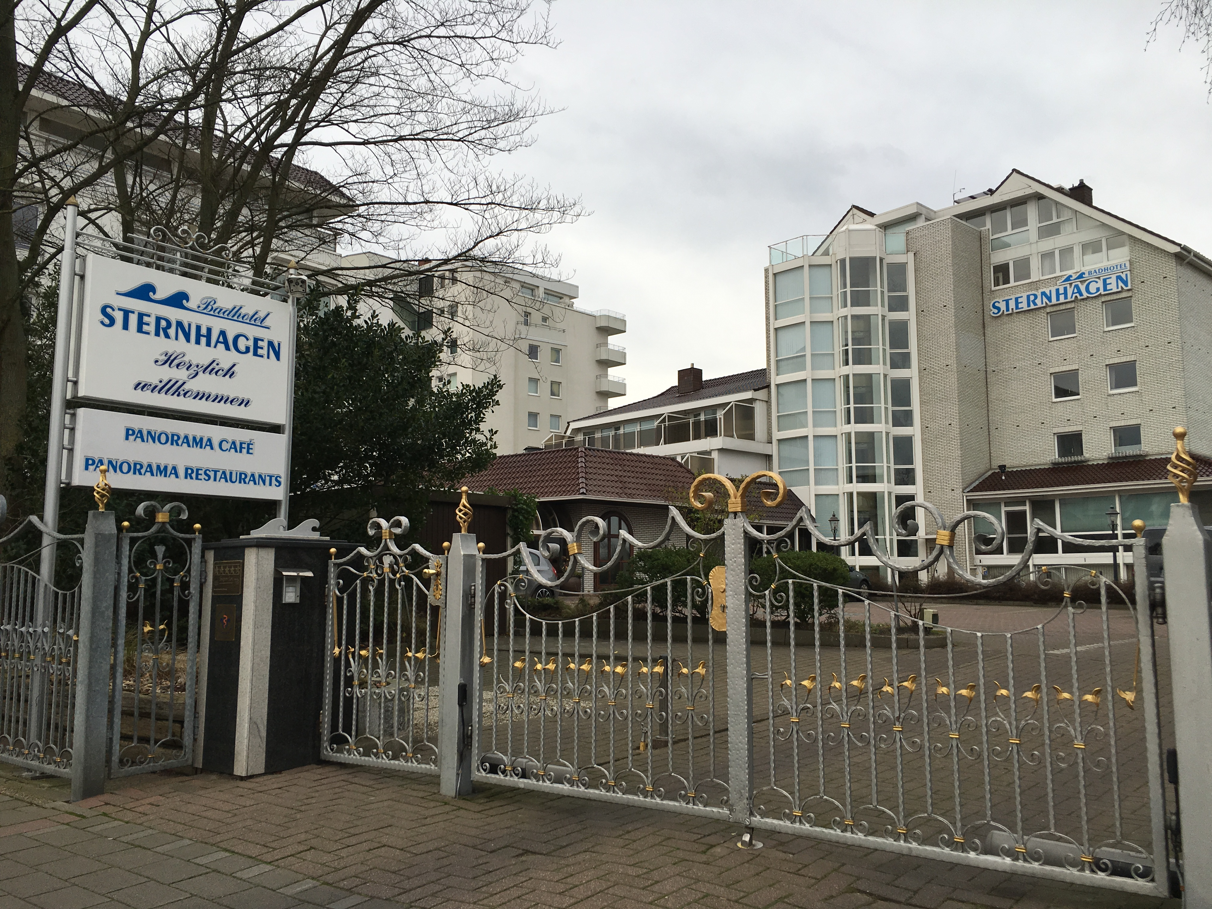 Badhotel Sternhagen in Cuxhoben